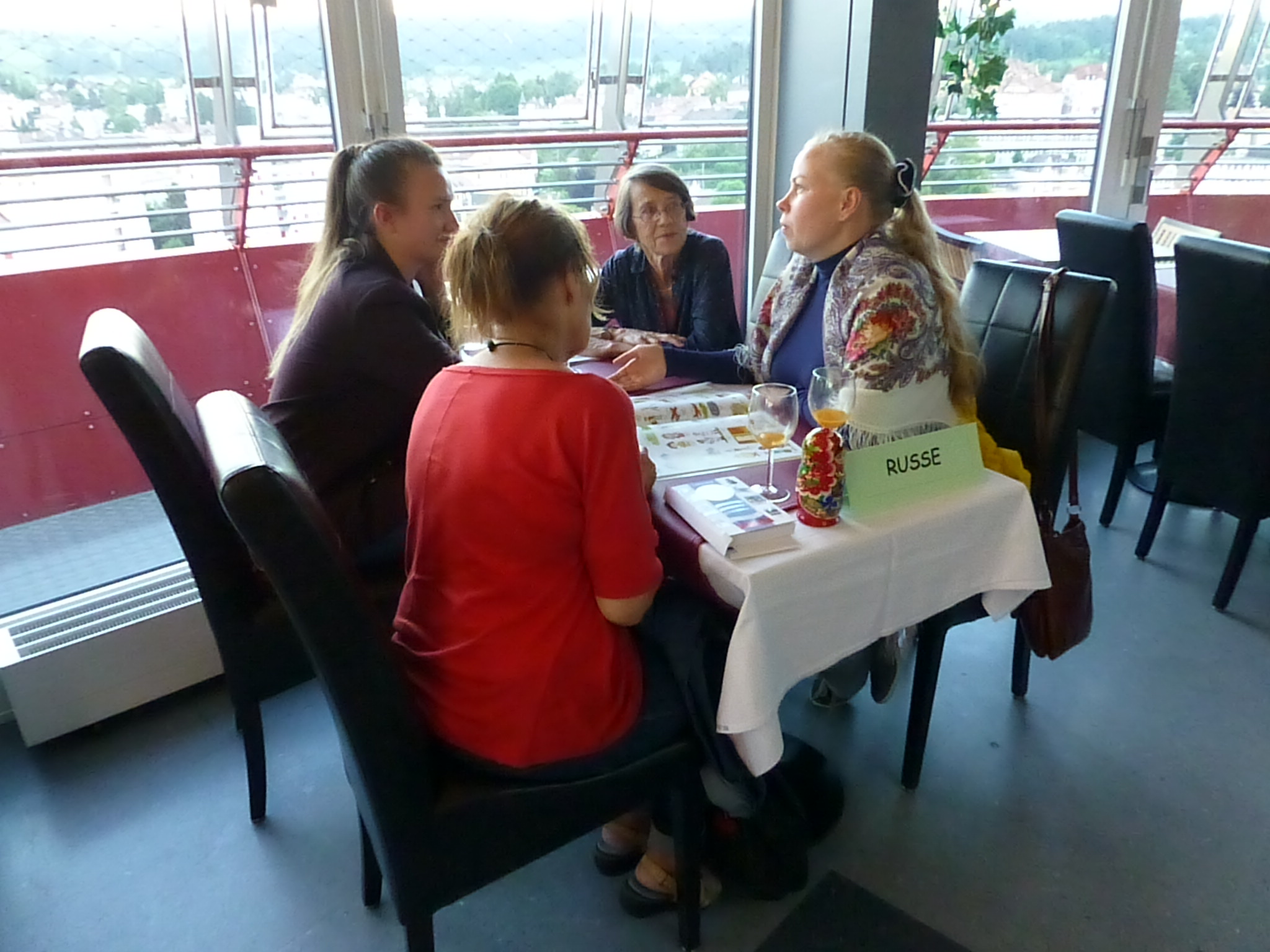 Lingva kafejo en La Chaux-de-Fonds, Svislando